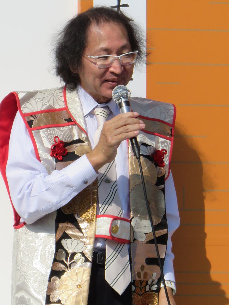 将棋棋士の福崎文吾（平成３０年１１月、姫路市で行われた人間将棋にて）